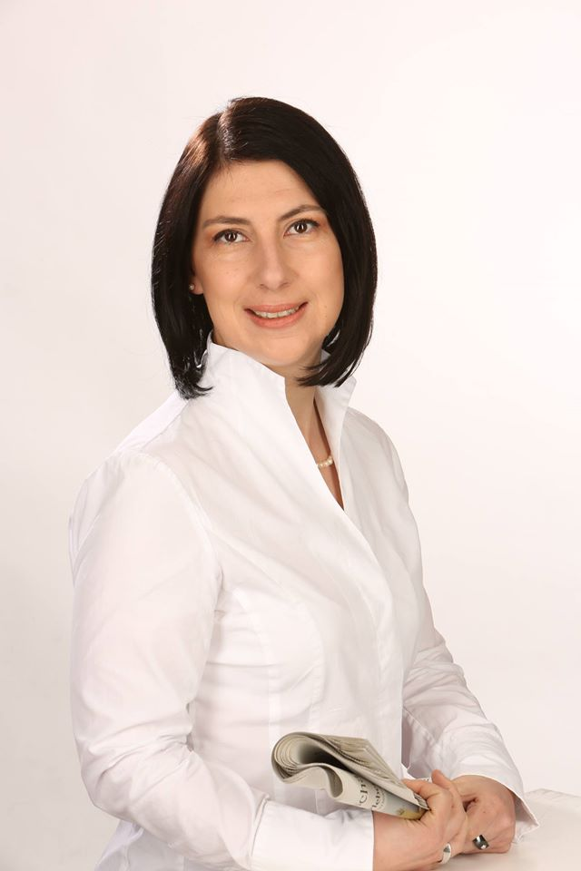 Katja Hessel (2016)